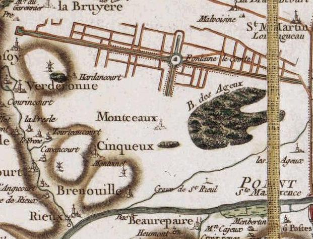 Monceaux (60) par la carte de Cassini.